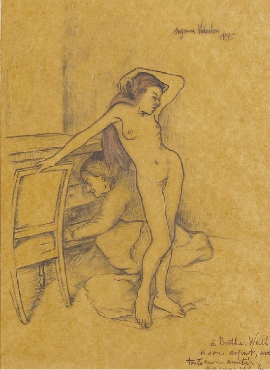 Suzanne Valadon: Nu, Kohle und Buntstift auf Papier, 29 x 20 cm, Privatbesitz.